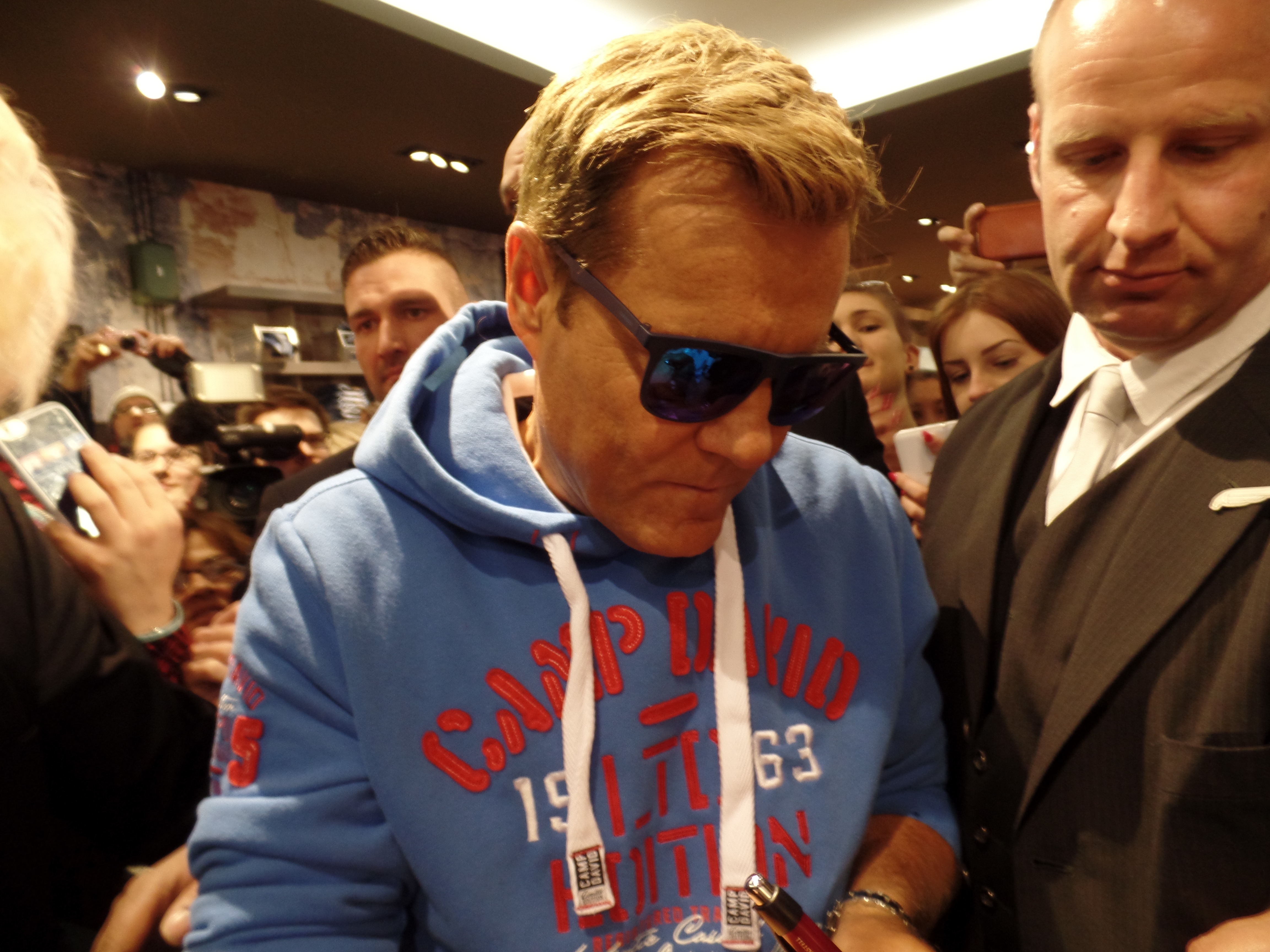 Dieter Bohlen in Oldenburg zur Camp David-Storeeröffnung